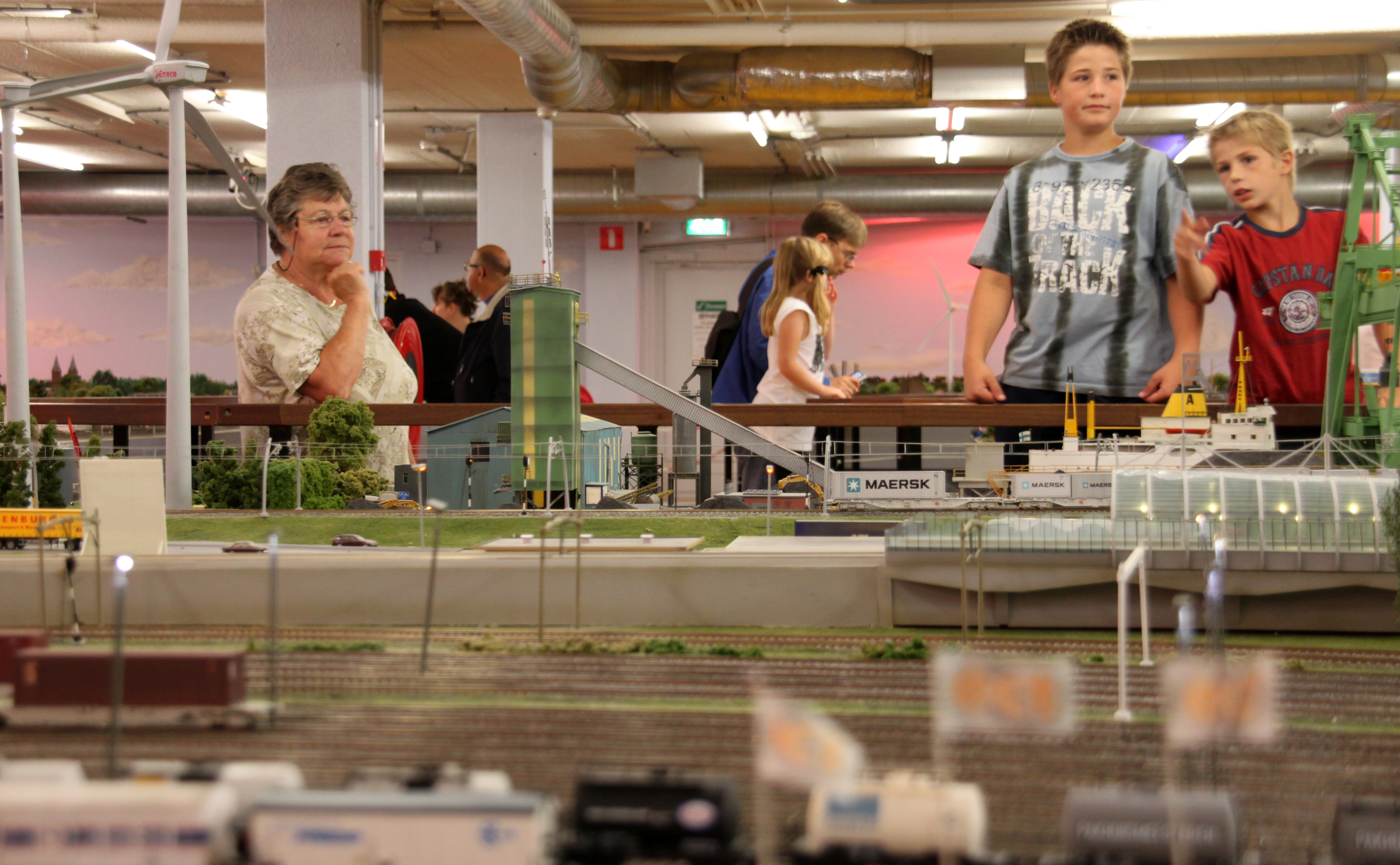 Publiek bij Railz Miniworld